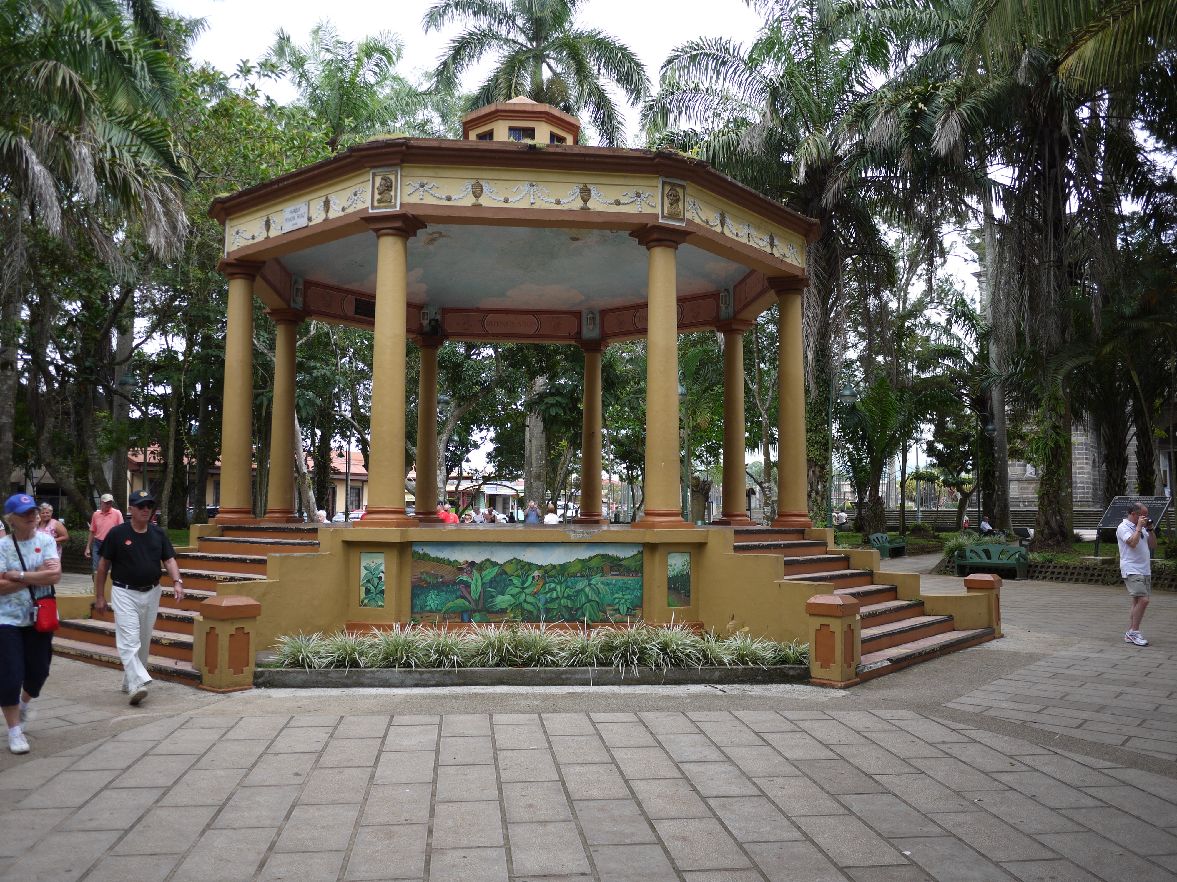 Parque central de Palmares, Costa Rica.